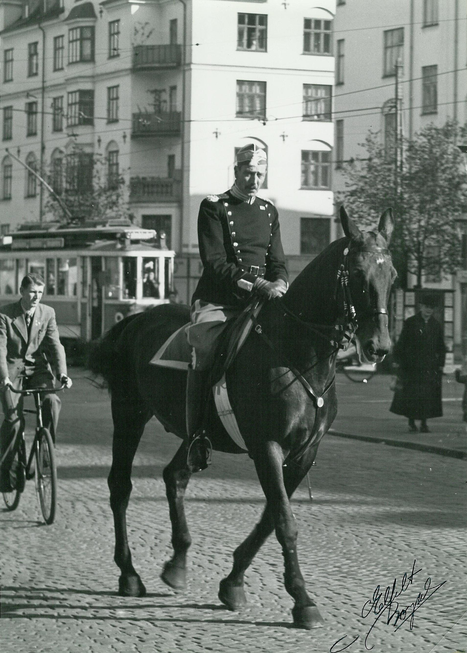 Kong Christian d. X på sin morgenridetur gennem København Sted: København Fotograf: Elfelt Se flere billeder her: Rights: More about The Museum of Danish Resistance (Frihedsmuseet)